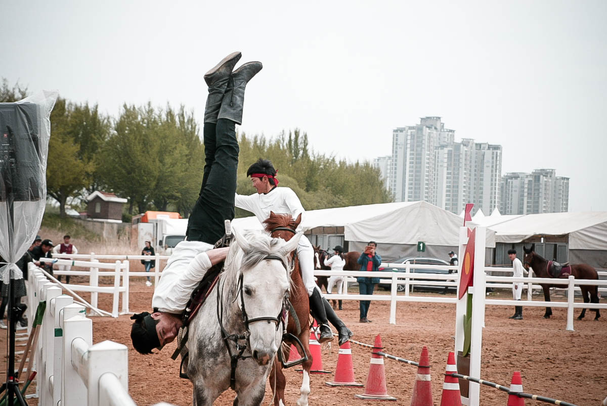 두 젊은이가 승마무예를 펼쳐보이고 있다.